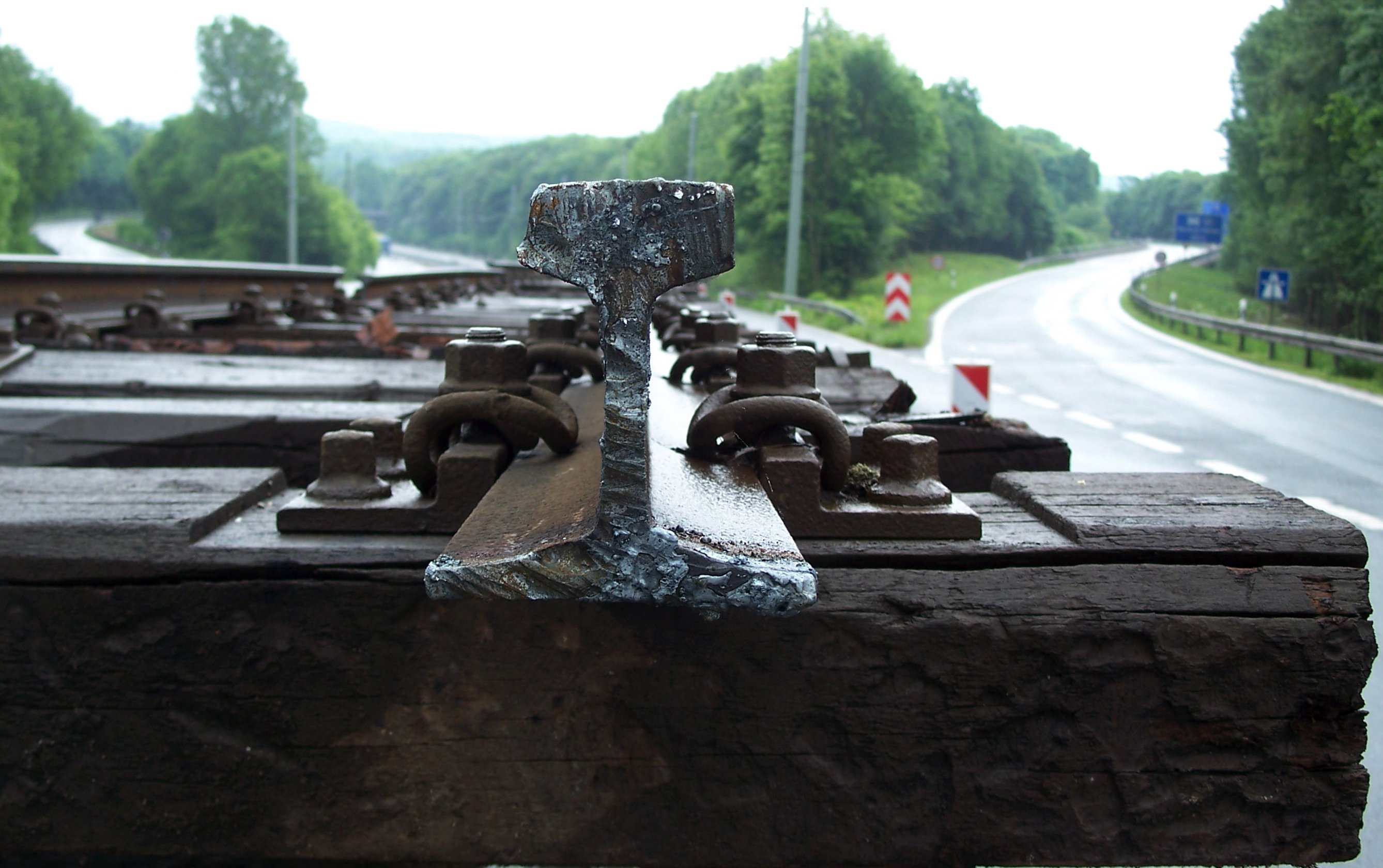 (Durchgebrannte) Vignolschiene einer Strassenbahn (Walzzeichen KRUPP 72 S41/10) mit Schienenhalter